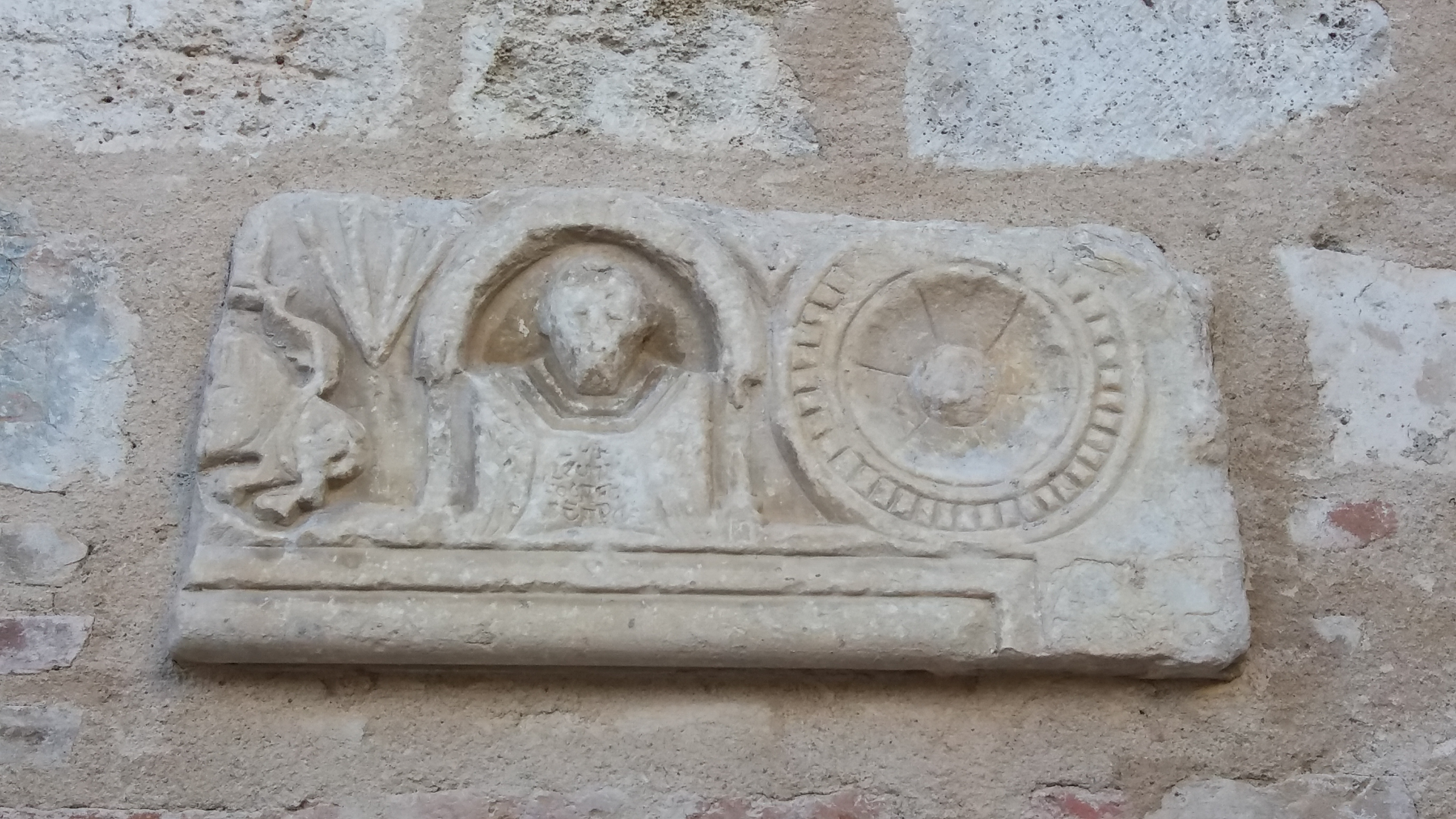 Fragment de llinda preromànica de la porta de l'església primitiva de Santa Maria de Pabirans